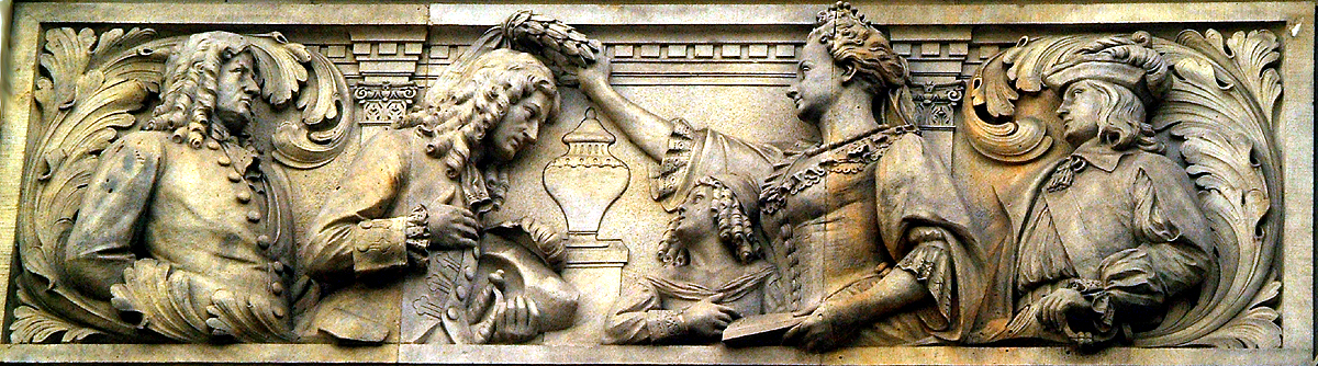 Kurfürstin Sophie von Hannover setzt dem Universalgenie Gottfried Wilhelm Leibniz um 1700 symbolisch den Lorbeerkranz auf; als Teil des halbplastischen Geschichts- oder auch "Bilderfrieses" am Neuen Rathaus in Hannover verewigte der Bildhauer Karl Gundelach das Thema ...